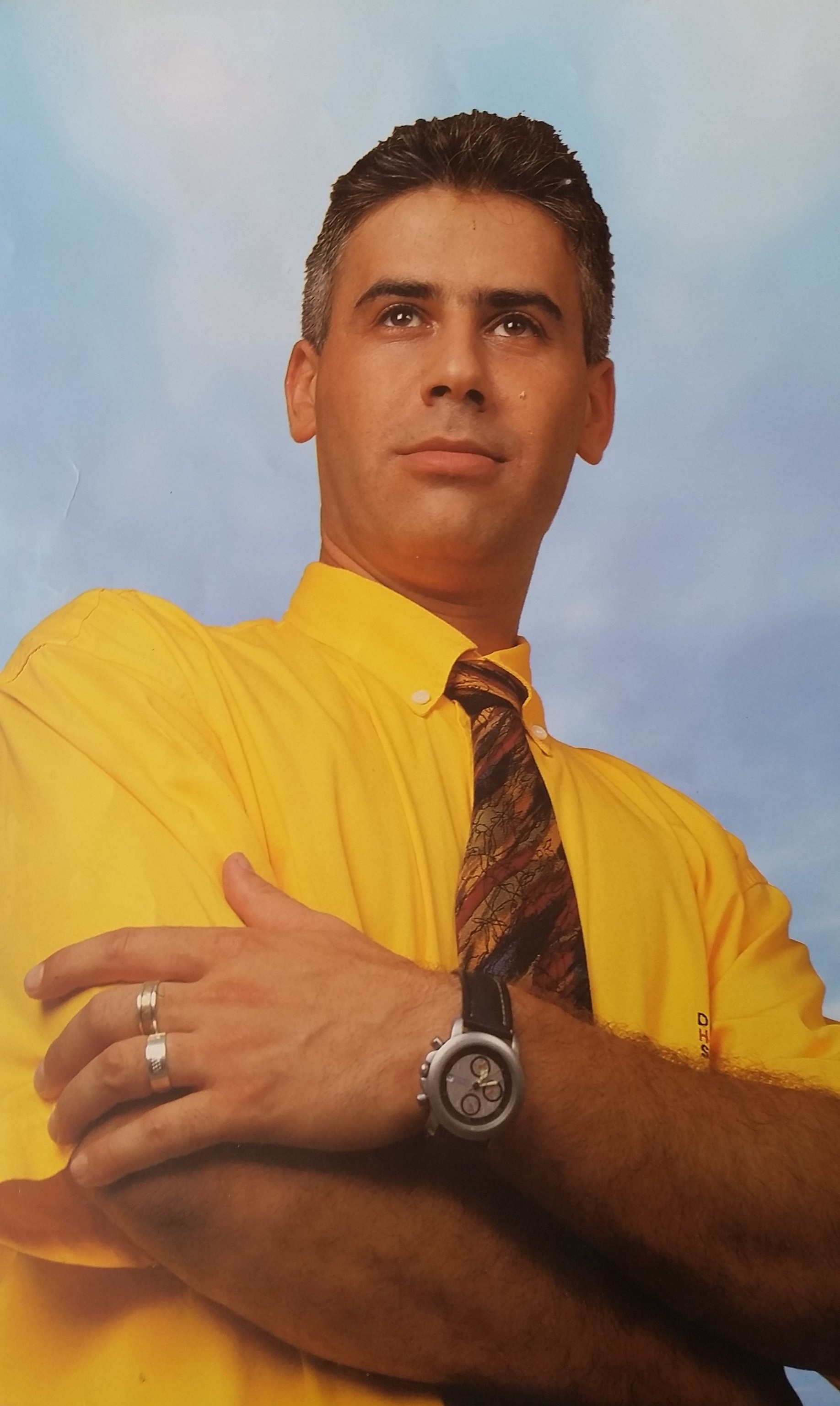 שלומי שטרן לפני חזרתו בתשובה